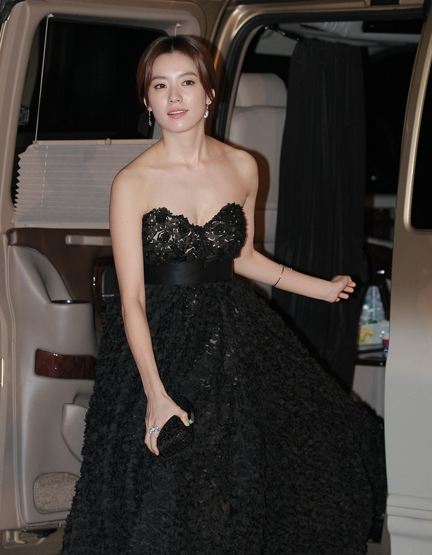 2013 청룡영화제